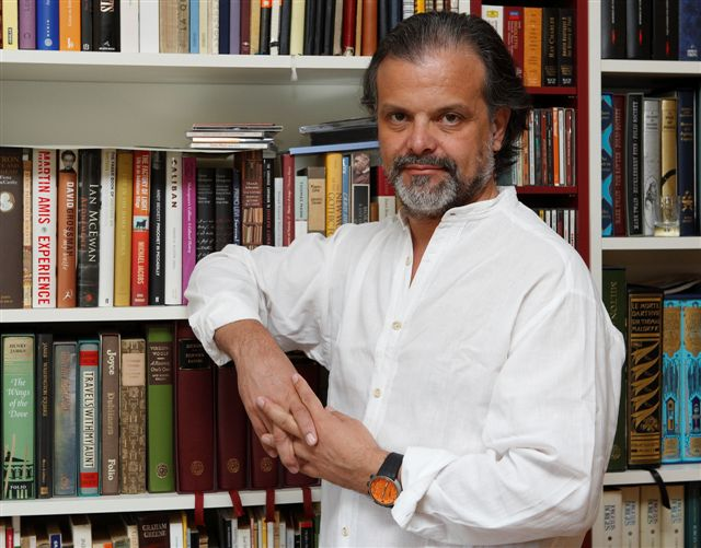 Madrid 2007